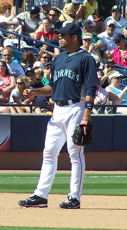 Matt Tuiasosopo